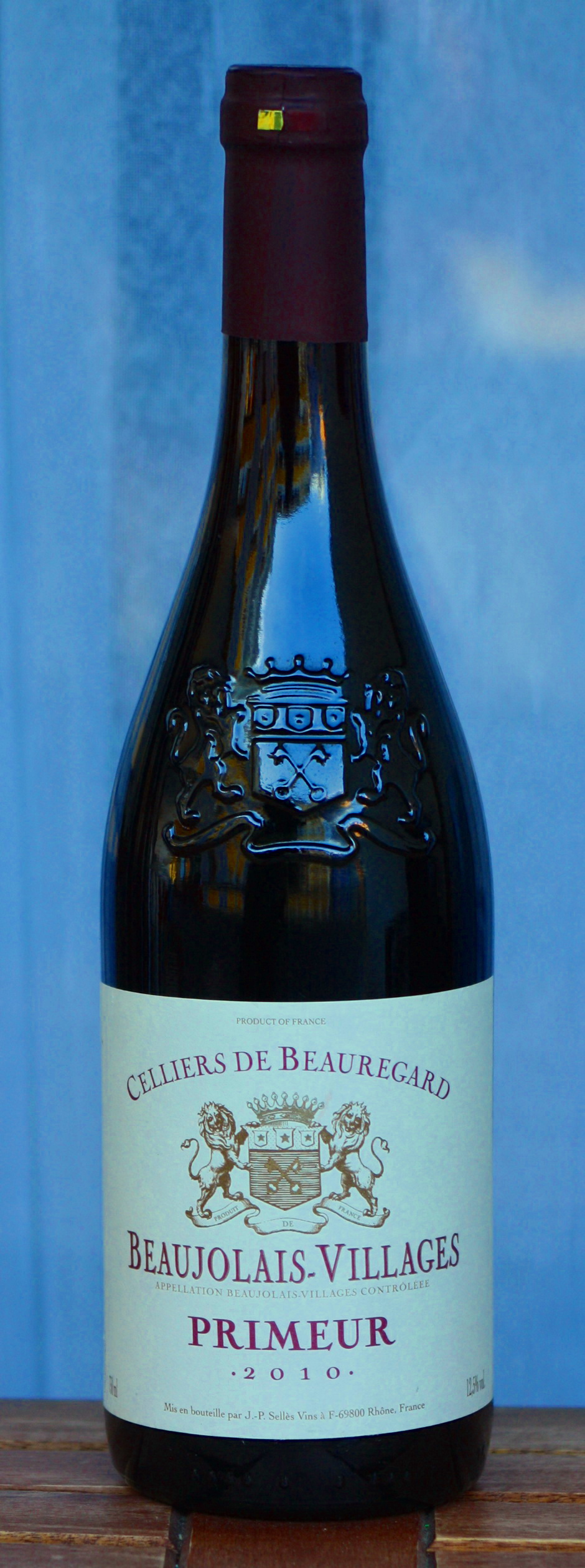 Flasche Französischer Rotwein. Beaujolais-Villages, Primeur, 2010, Celliers de Beauregard. Appellation Beaujolais Villages Controleee. Geschmack: fruchtig, trocken Rebsorte: Gamay Anbaugebiet: Beaujolais/Frankreich Alc 12,5% vol